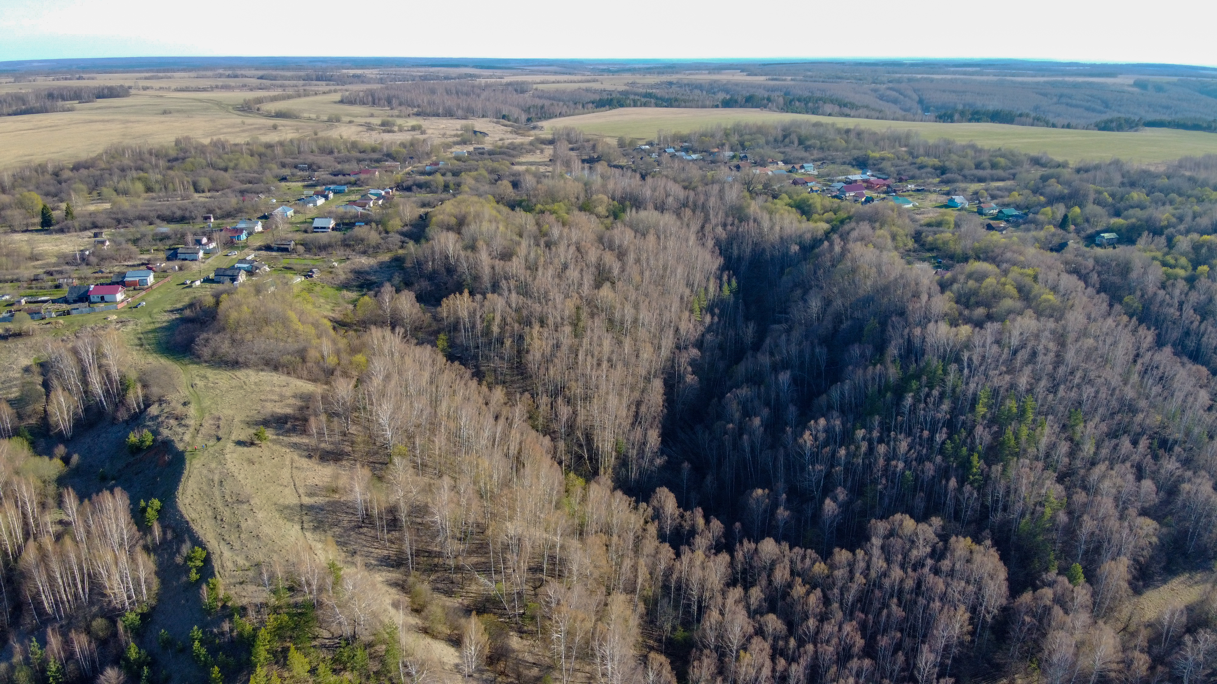 Вид на Оку и Муромский заказник со склонов деревни Сапун